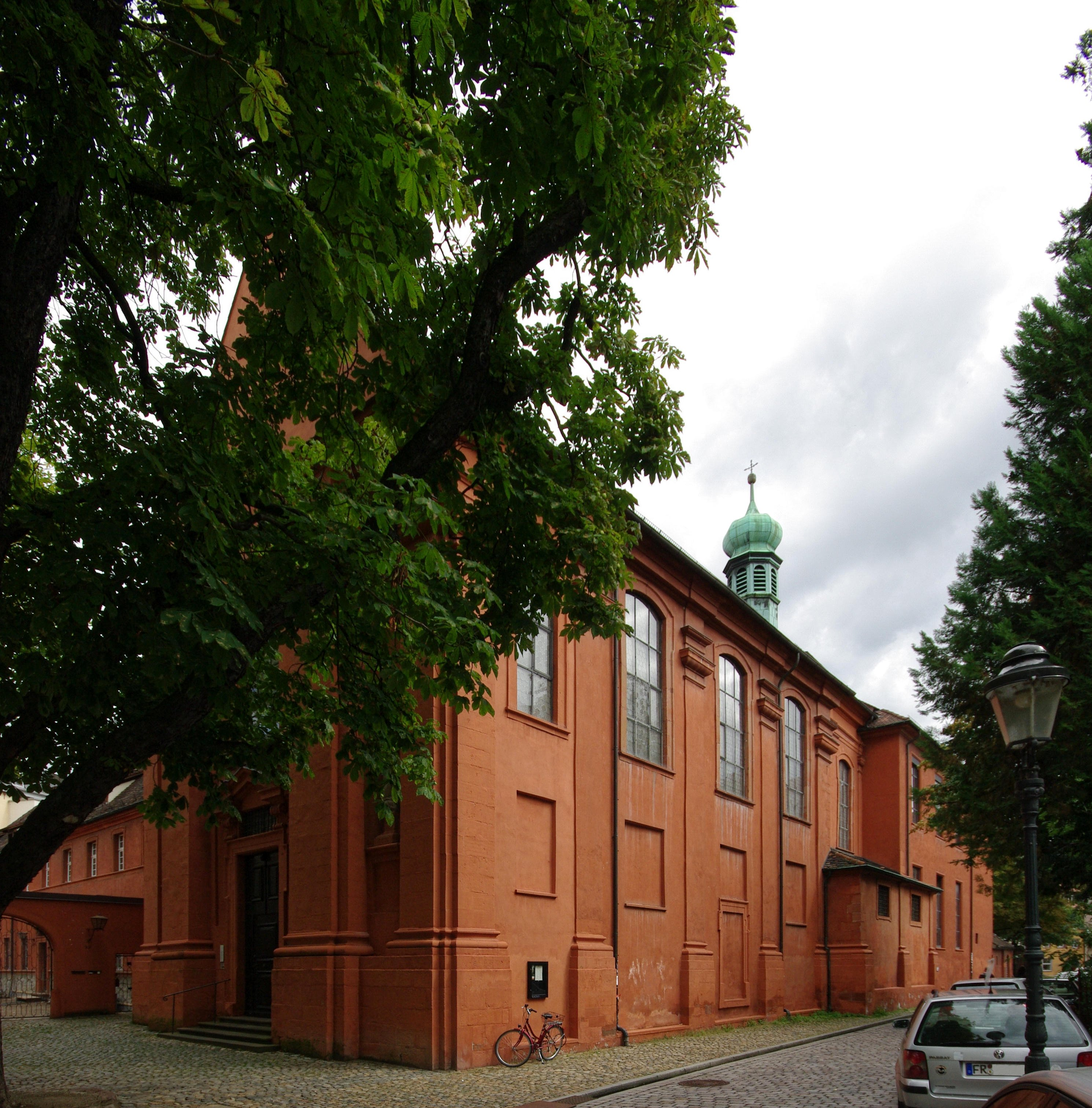 Adelhauser Kirche